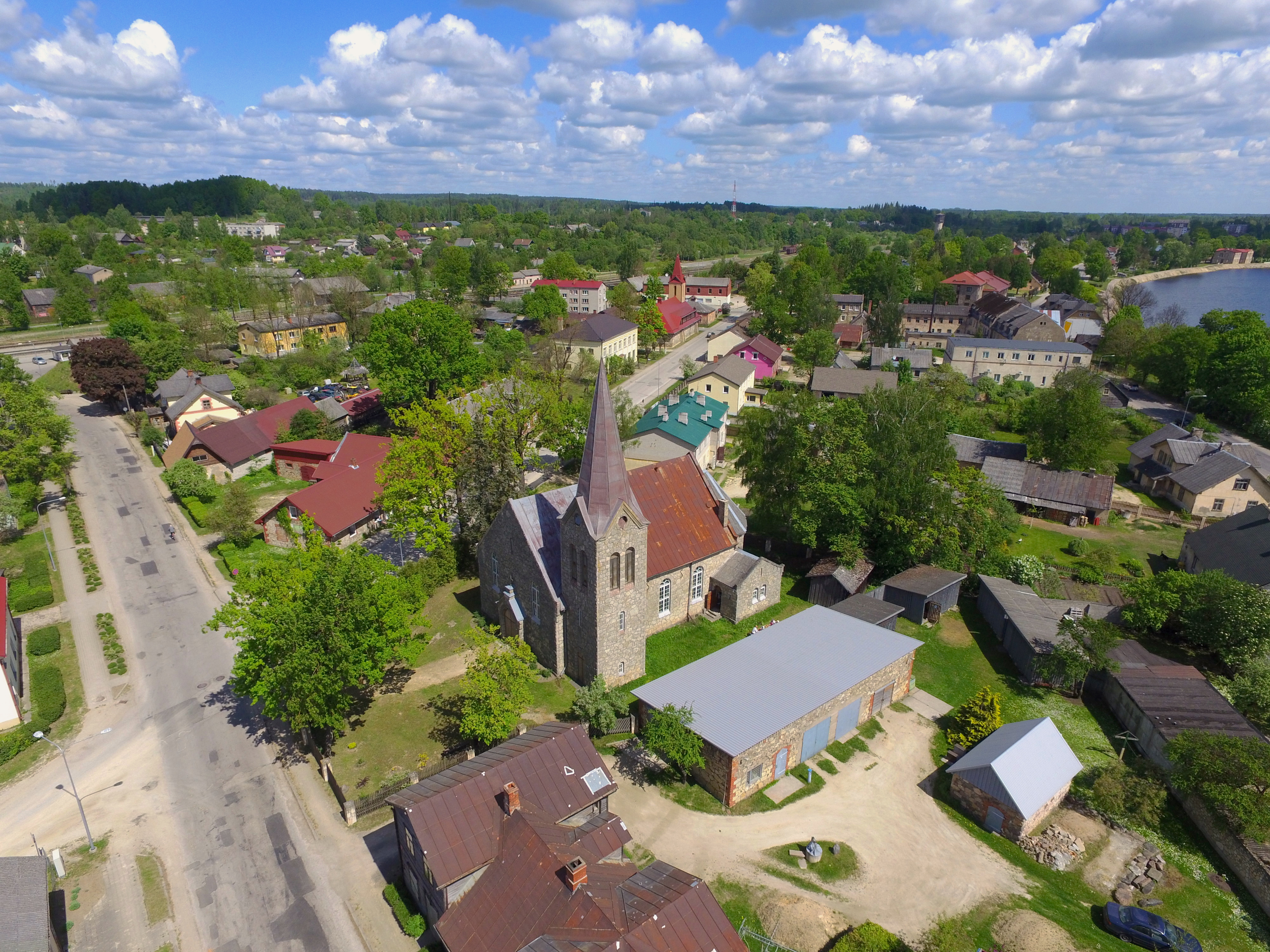 Pļaviņu luterāņu baznīca, Pļaviņas, Raiņa iela 18